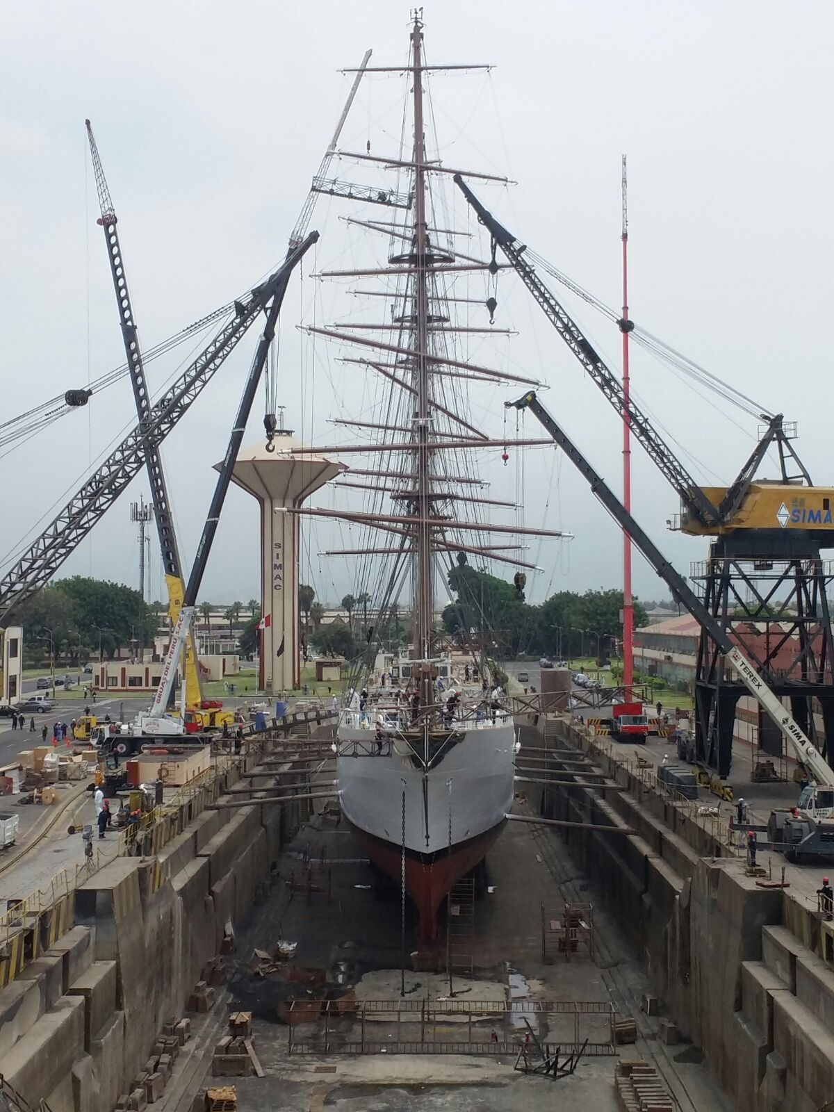 BAP Unión en dique del SIMA